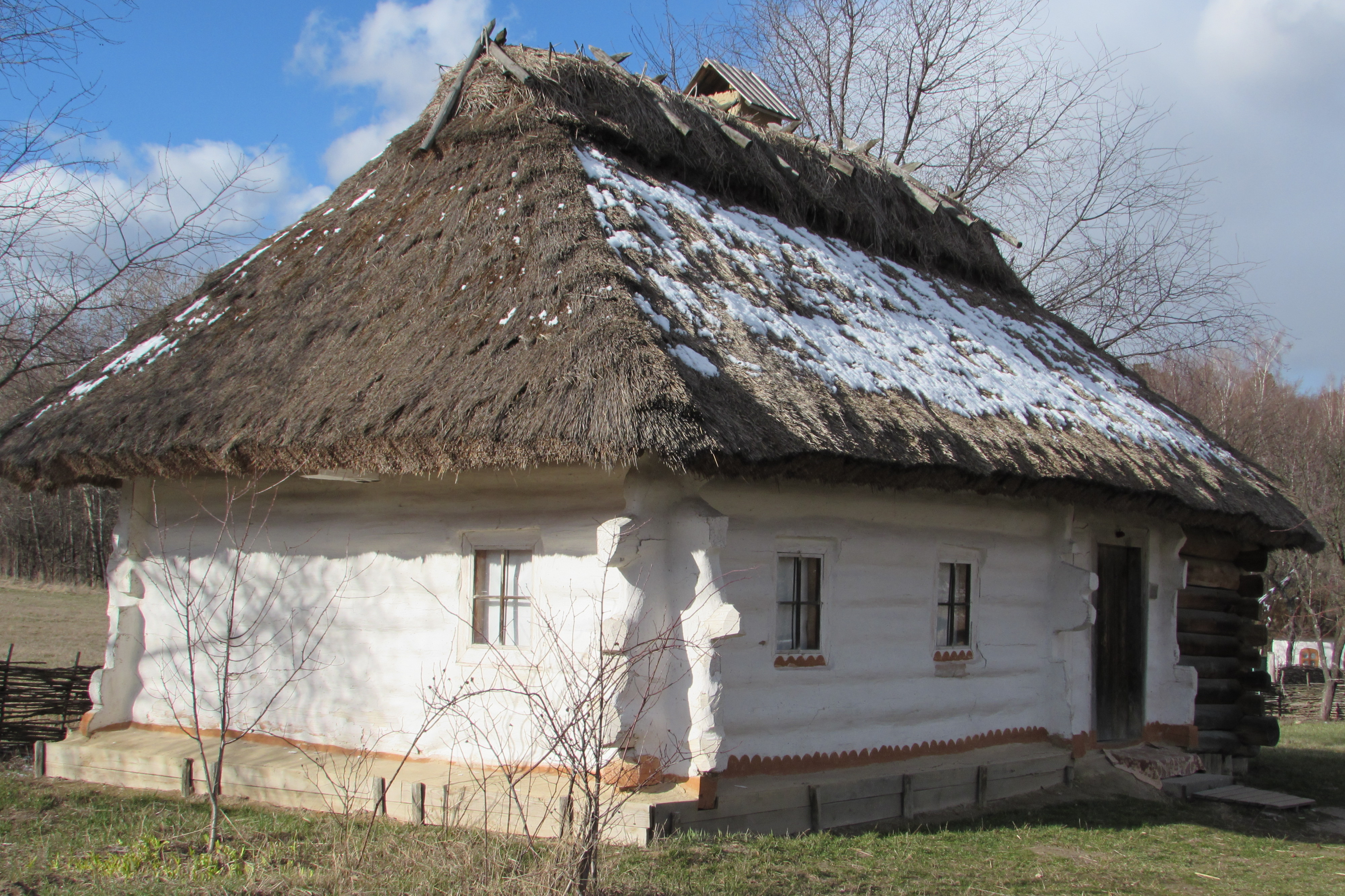 Хата з села Таборів Сквирського району Київської області, Київ, Пирогів